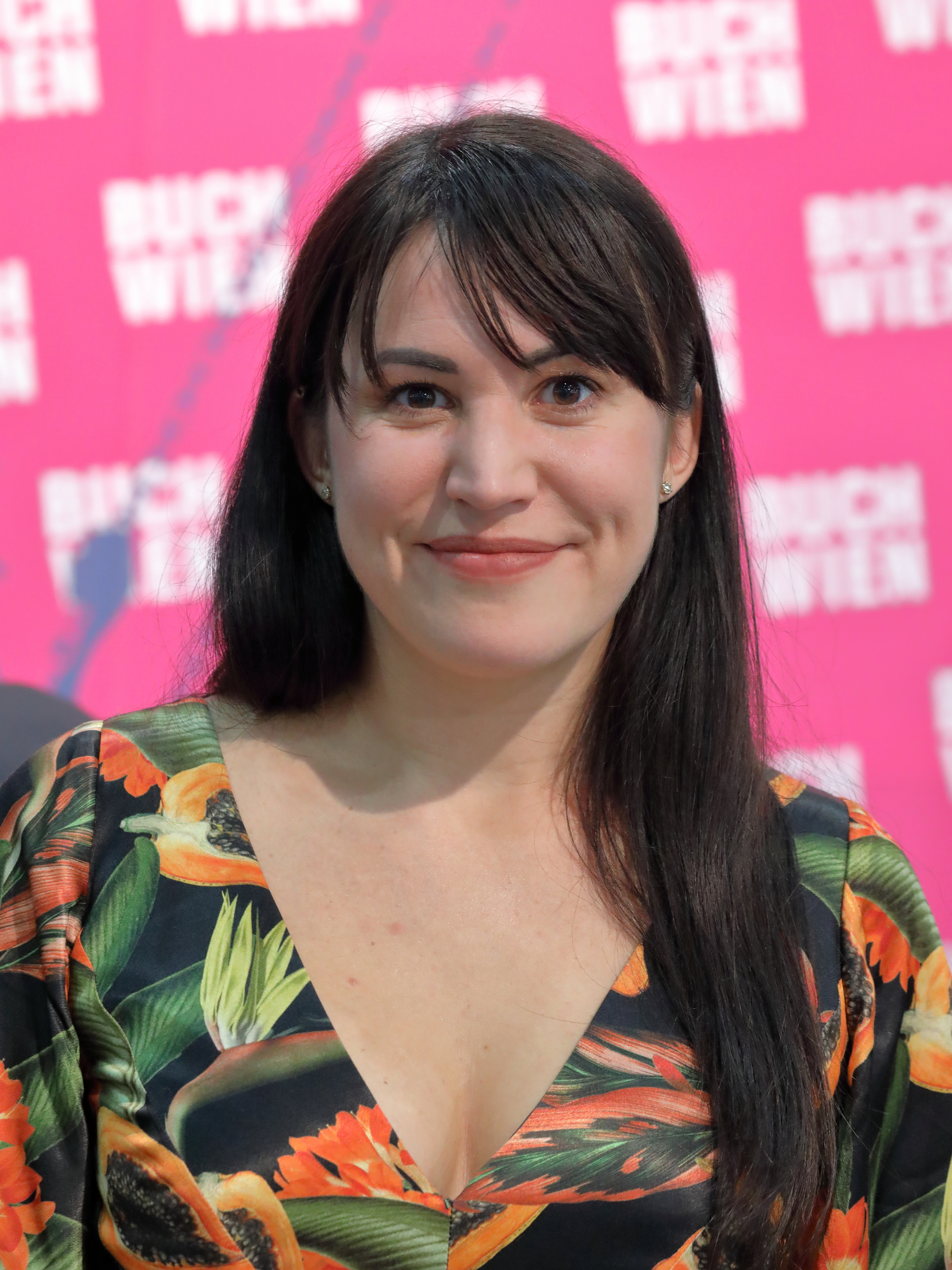 Die österreichische Schriftstellerin Vea Kaiser auf der Wiener Buchmesse 2019.